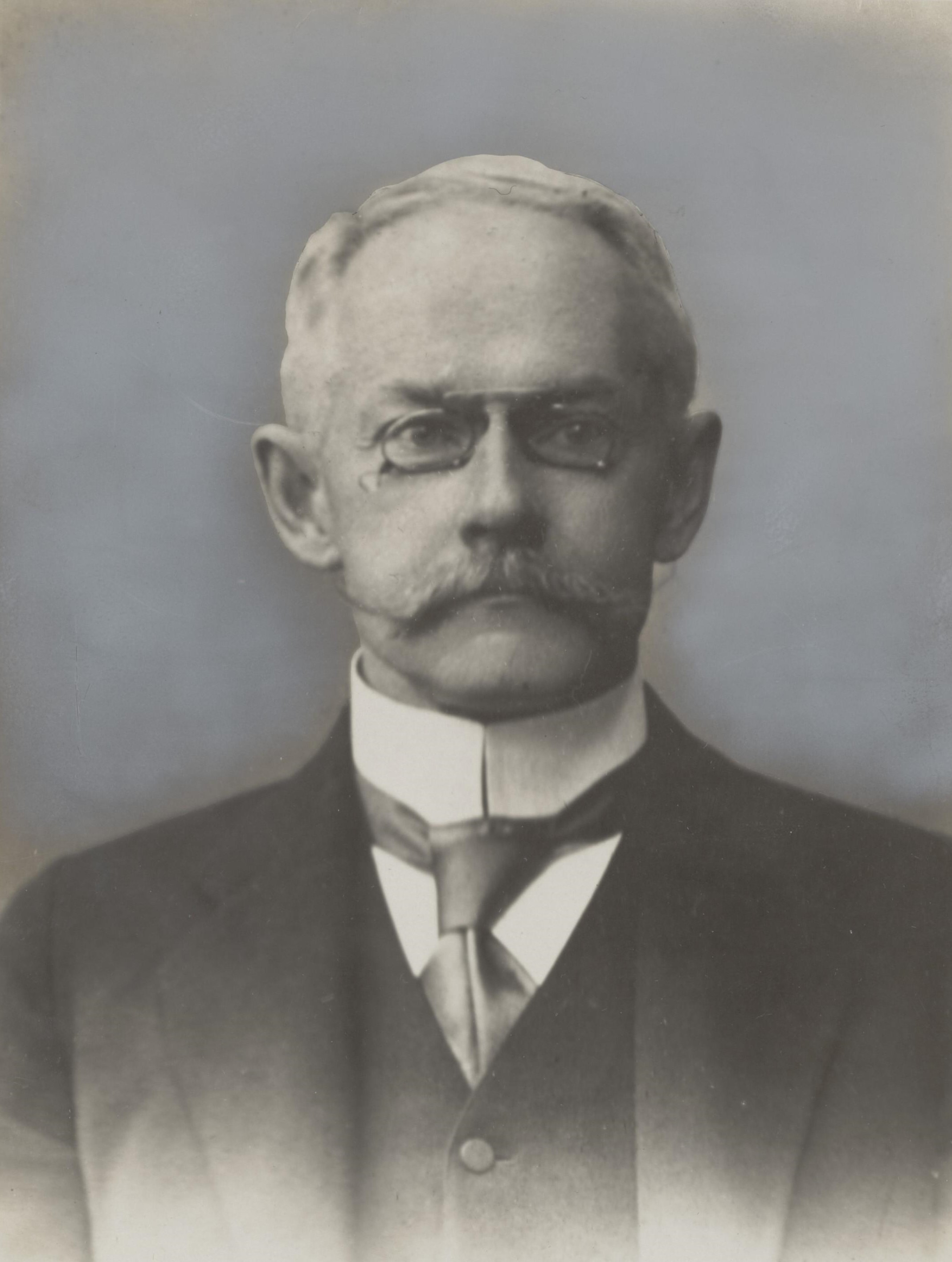 Mr. G. Schimmelpenninck, burgemeester van Wijhe, viert 15 februari 1926 zijn 25-jarig ambtsjubileum.